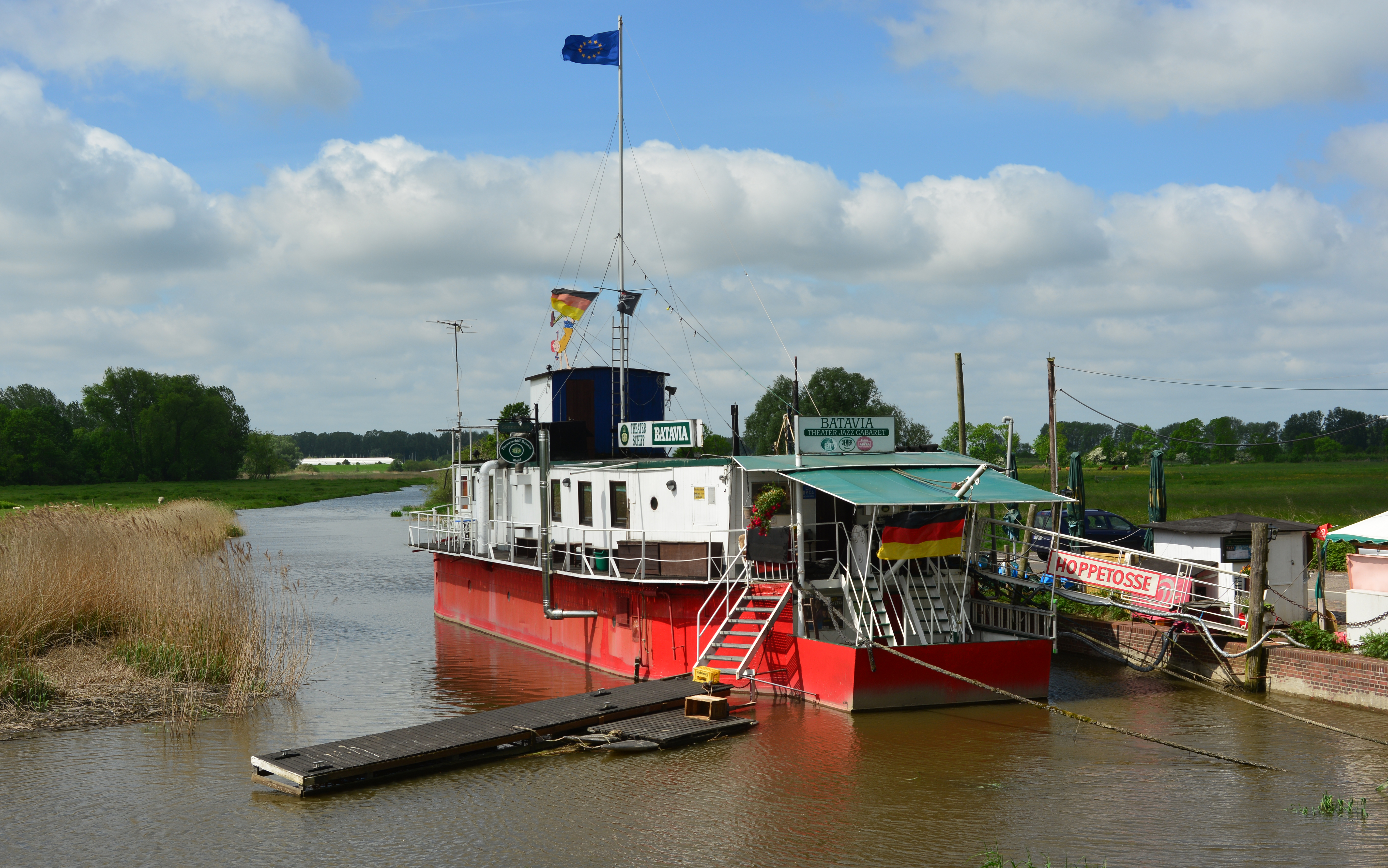 Das Teatherschiff Batavia auf der Wedeler Au in Wedel.